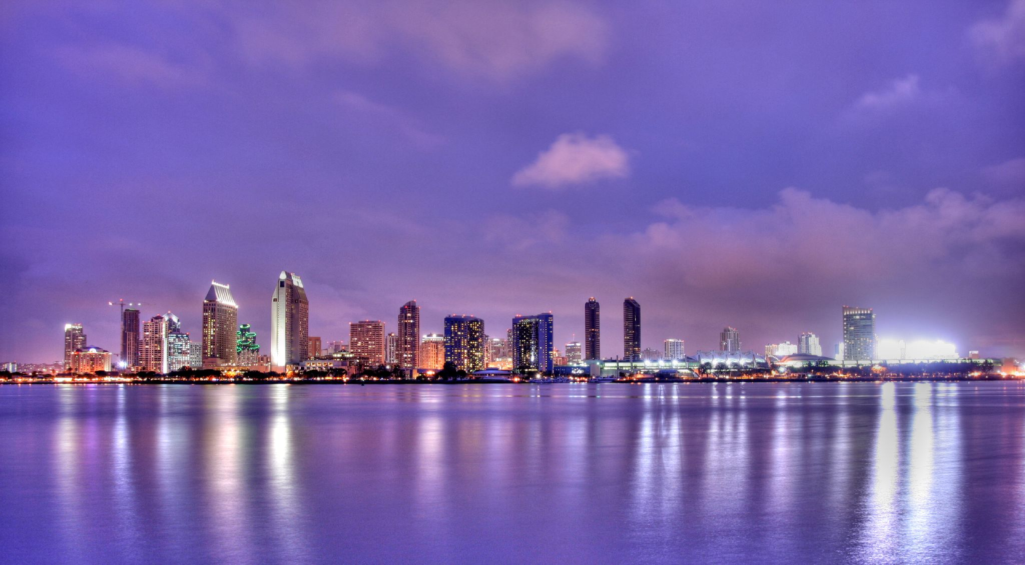 Panorama de la ciudad de San Diego